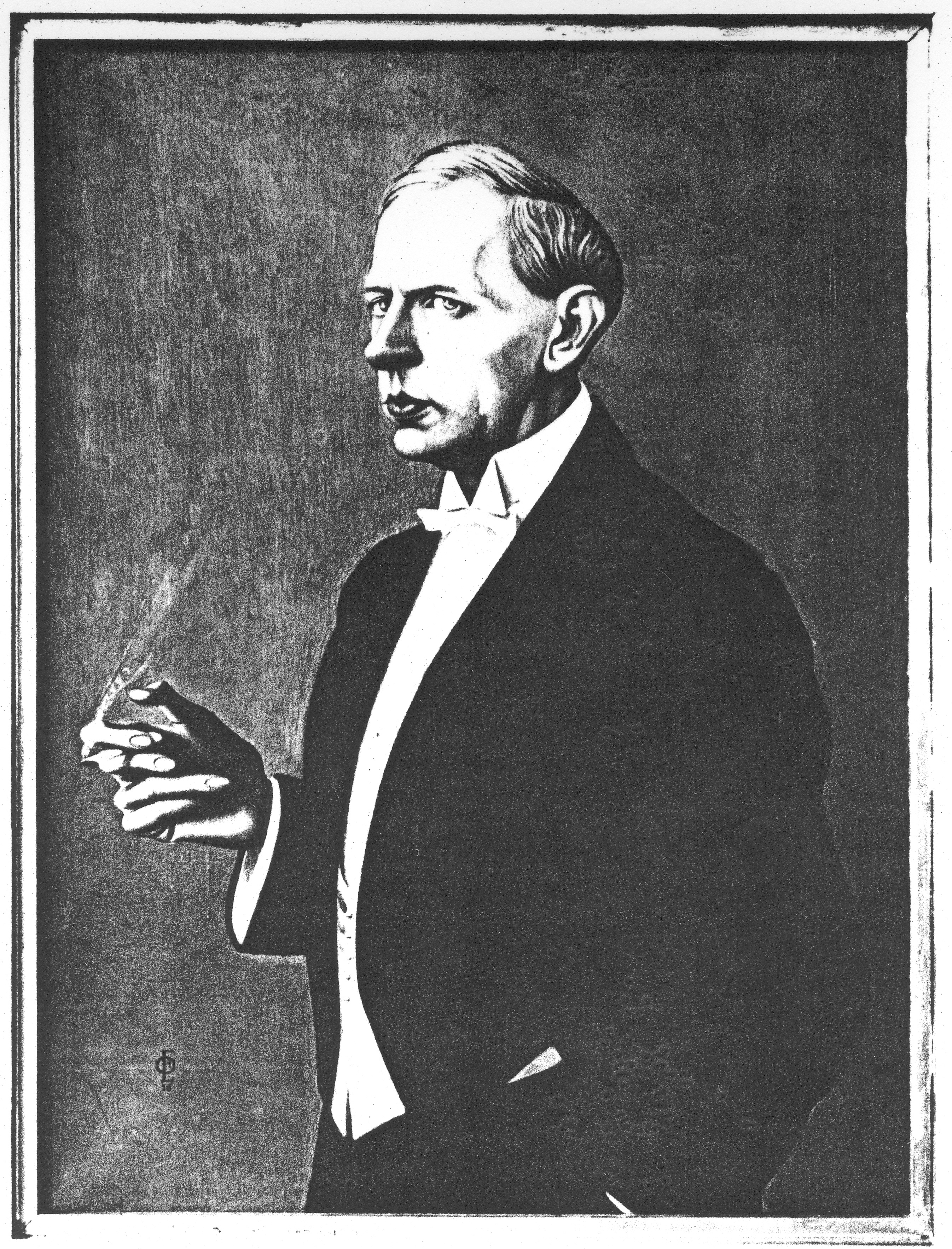 Gemälde Heinar Schilling